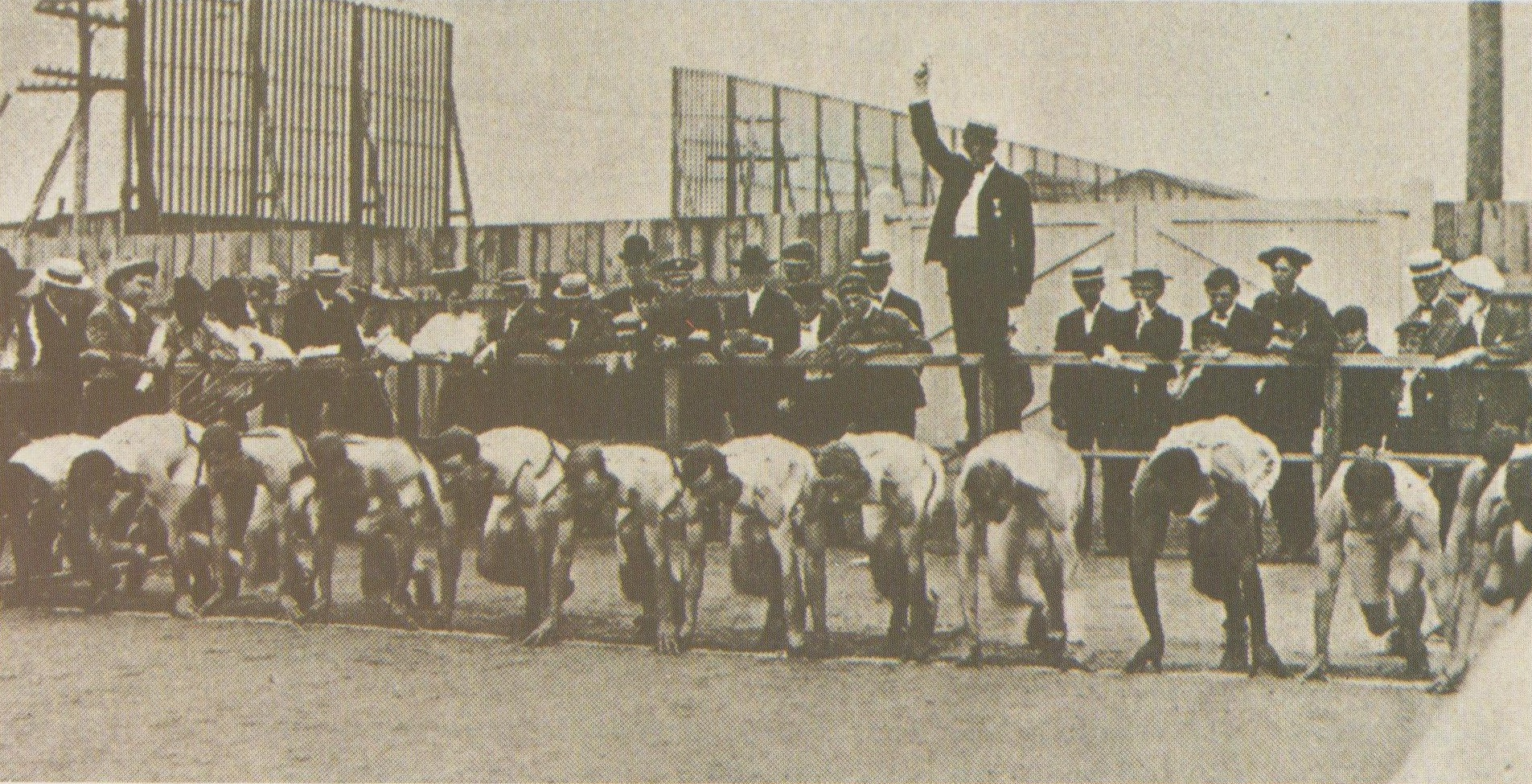 La partenza dei 400 metri piani ai Giochi olimpici di Saint Louis 1904.